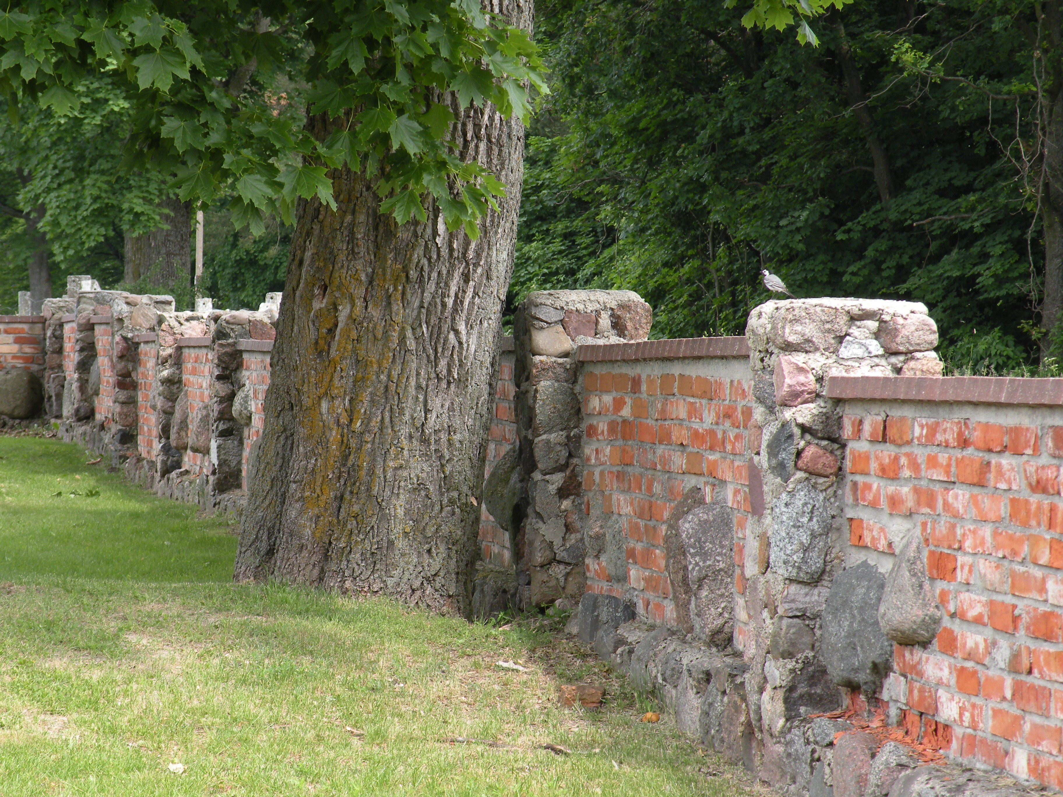 Bałdy